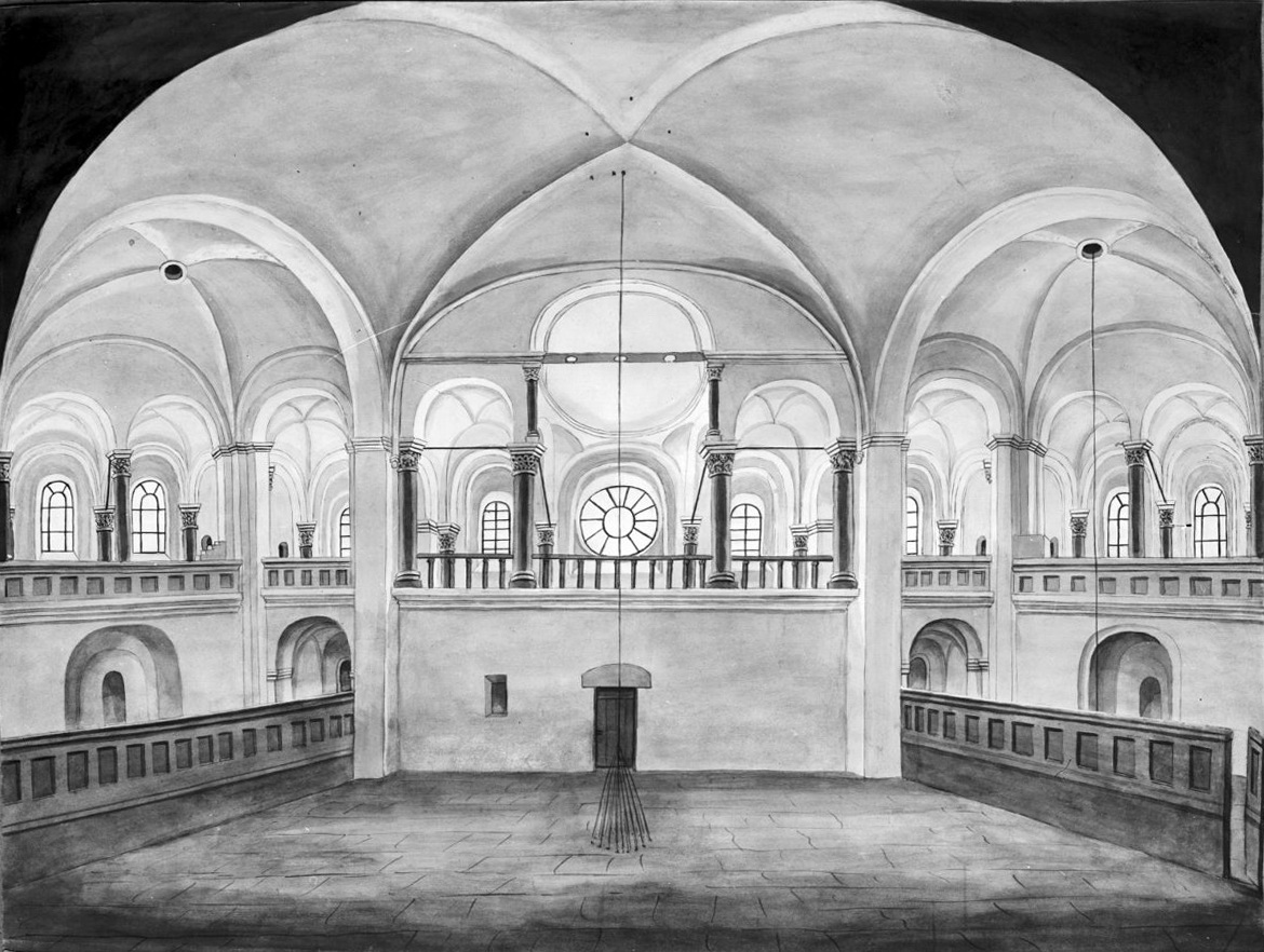 Sint-Servaaskerk, Maastricht: tekening van Philippe van Gulpen van het westwerk, waarschijnlijk een reconstructie van de historische situatie vóór de plaatsing van het orgel en het standbeeld van Karel de Grote.